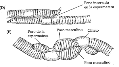 Lombrices de tierra copulando